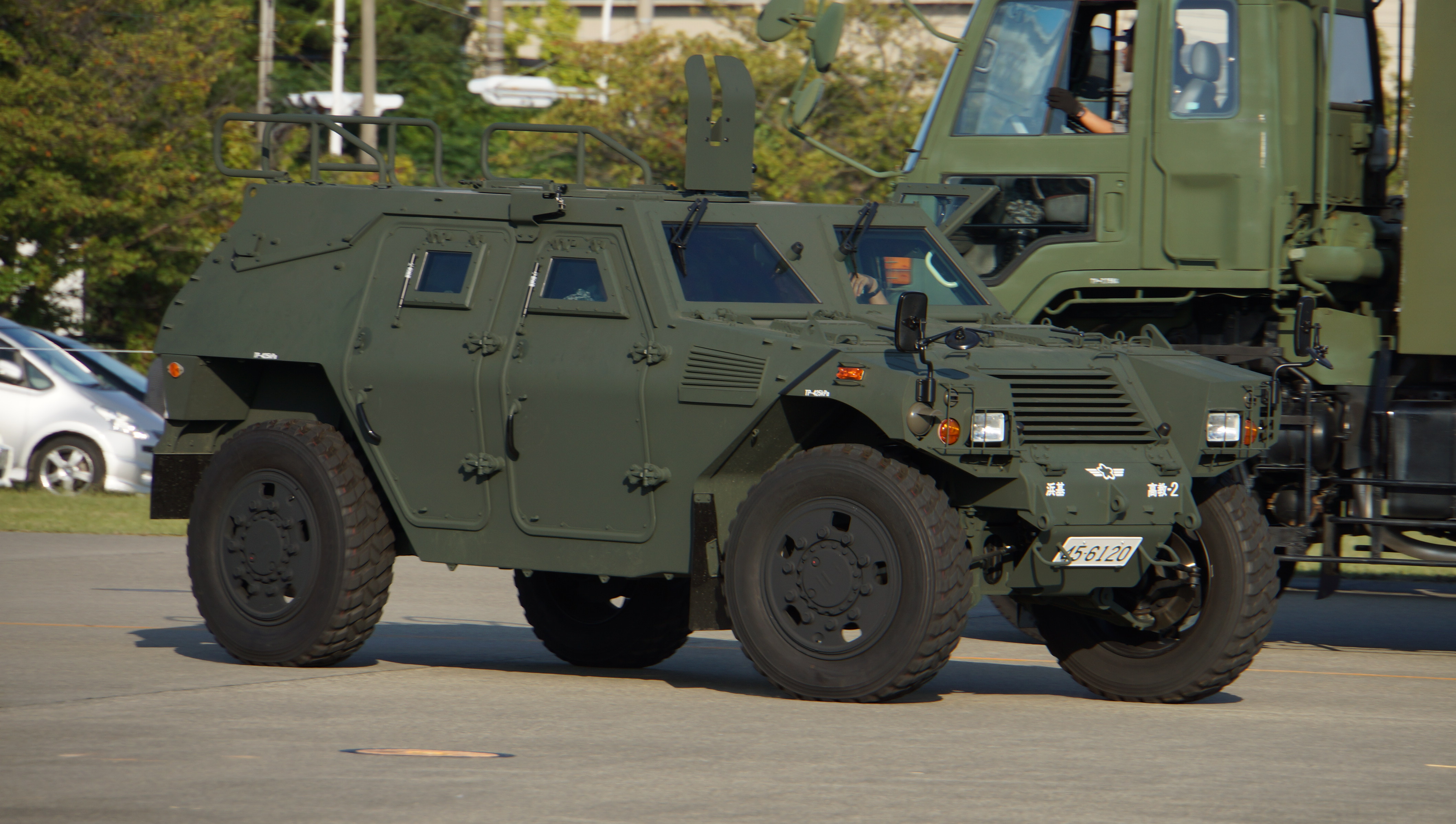 航空自衛隊 軽装甲機動車（45-6120号車） 右前面。2014年9月28日 浜松基地にて。